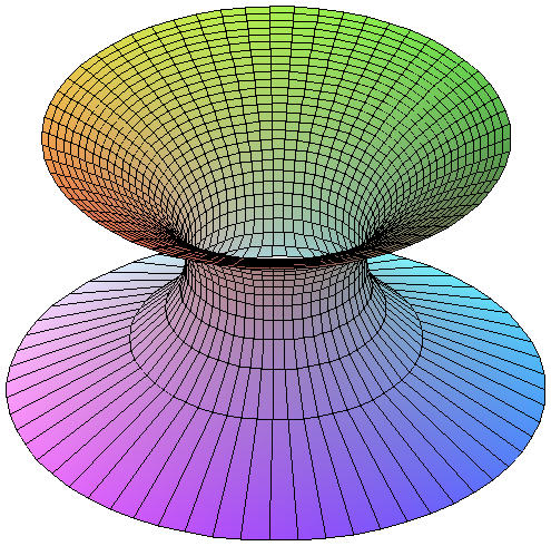 Der Katendoid